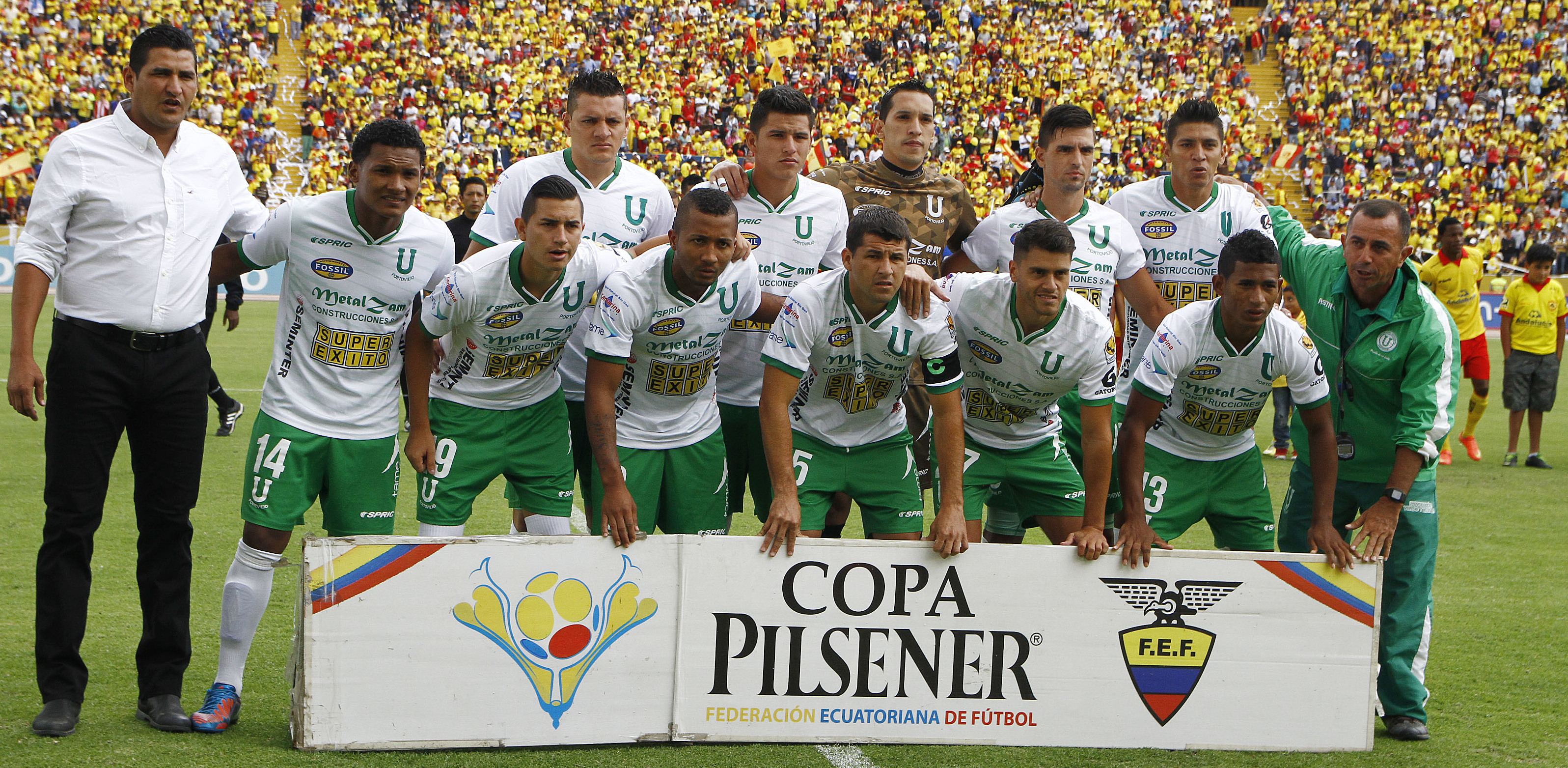 Quito, 16 nov (Andes).- Una explosión de júbilo se vivió este domingo en el estadio Atahualpa cuando el Aucas consiguió su anhelado regreso a la Serie A luego de ocho años de ausencia al empatar 1-1 con la Liga de Portoviejo.